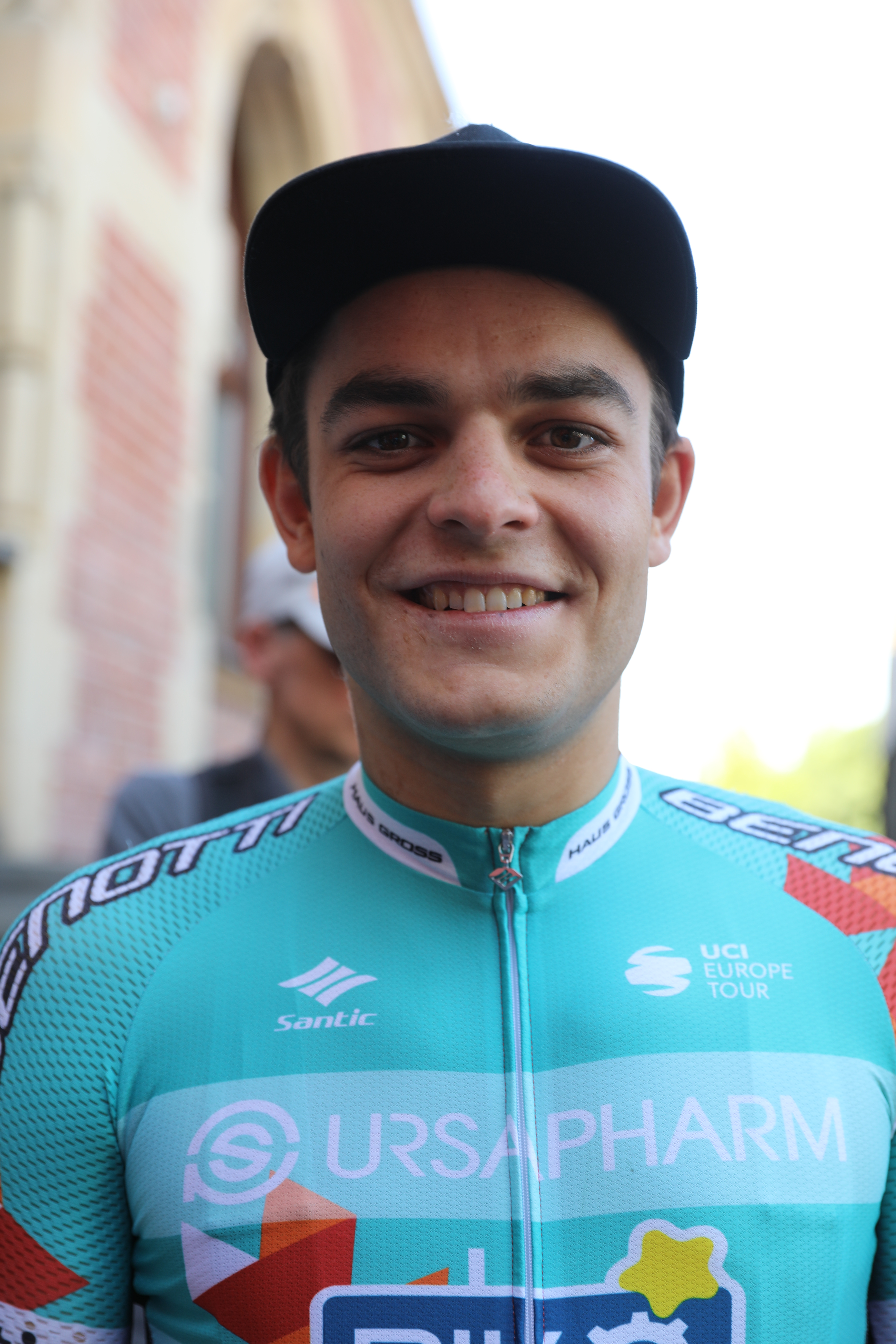 Lucas Carstensen, deutscher Radrennfahrer